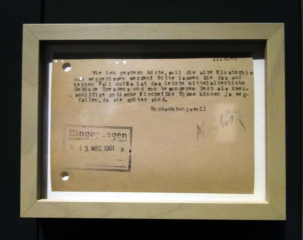 Postkarte zum geplanten Abriss der Sophienkirche 1961